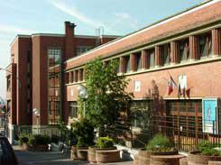 Façade du lycée Edouard Branly de Nogent sur Marne, dans le Val de Marne, dans la banlieue parisienne (France).